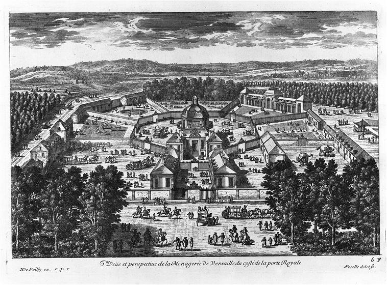 Veüe et perspectiue de la Ménagerie de Versaille du costé de la porte Royale, estampes de la ménagerie de Versailles peinte par Adam Pérelle (1638-1695), Nicolas de Poilly l'Ancien (1626-1696)